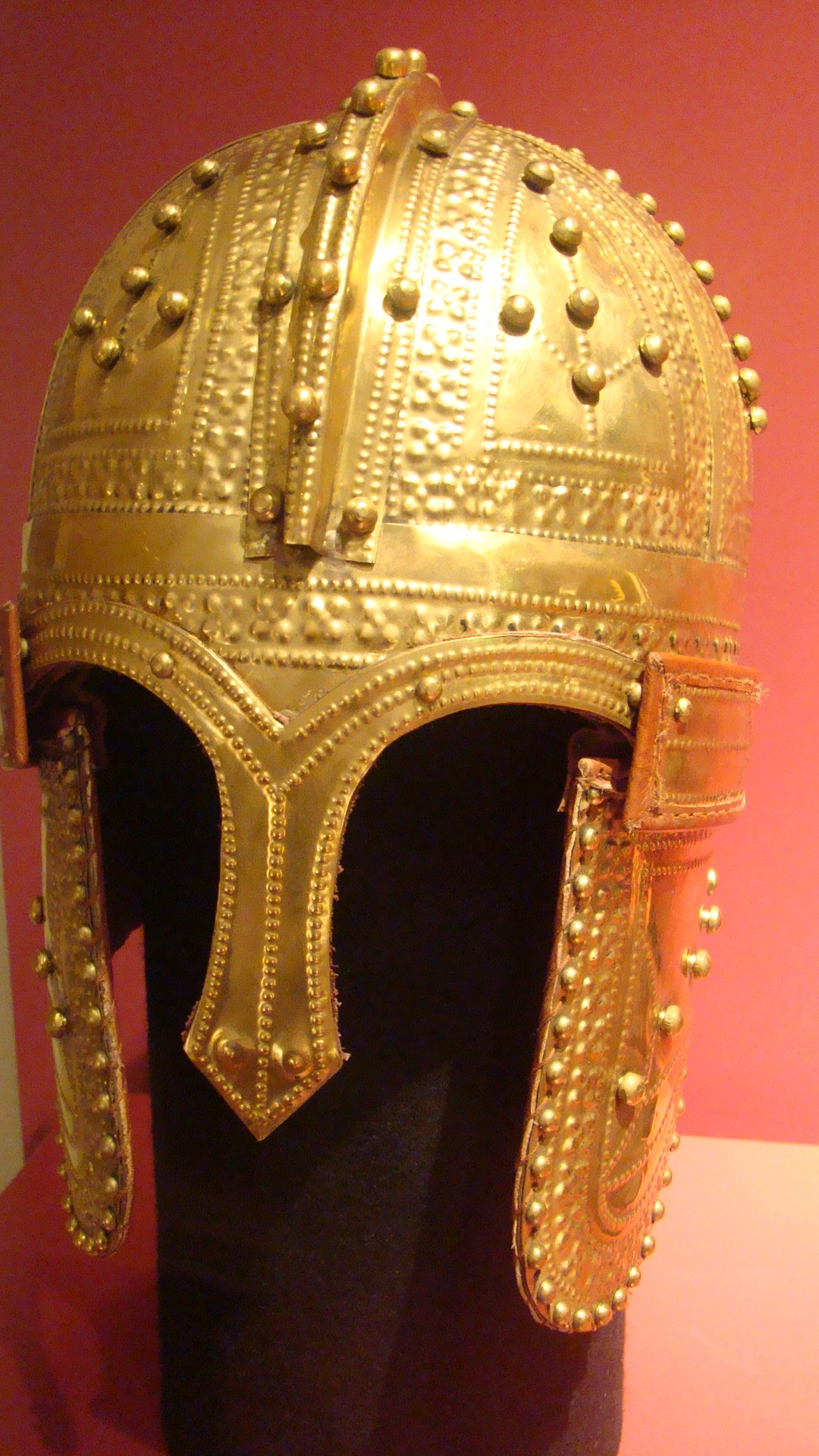 In 1910 werd in het veen bij Helenaveen bovendien een verguld-zilveren Romeinse helm aangetroffen. Dichtbij de helm lagen ook wat persoonlijke bezittingen: Schoenen, Munten, Beslagstukken, ruiter spoor, fibula en klokjes. Deze helm is te bezichtigen in het Rijksmuseum van Oudheden in Leiden. Op de afbeelding ziet u een matige kopie van de originele helm. In 1910, a silver-plated Roman helmet found in the peat at Helenaveen. Near the helmet were also some personal belongings: Shoes, Coins, Attachment Pieces, spurs, fibula and little bells. This helmet is on display in the Museum of Antiquities in Leiden.